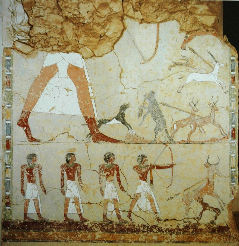 Wüstenjagd, Grab des Ineni (TT81)